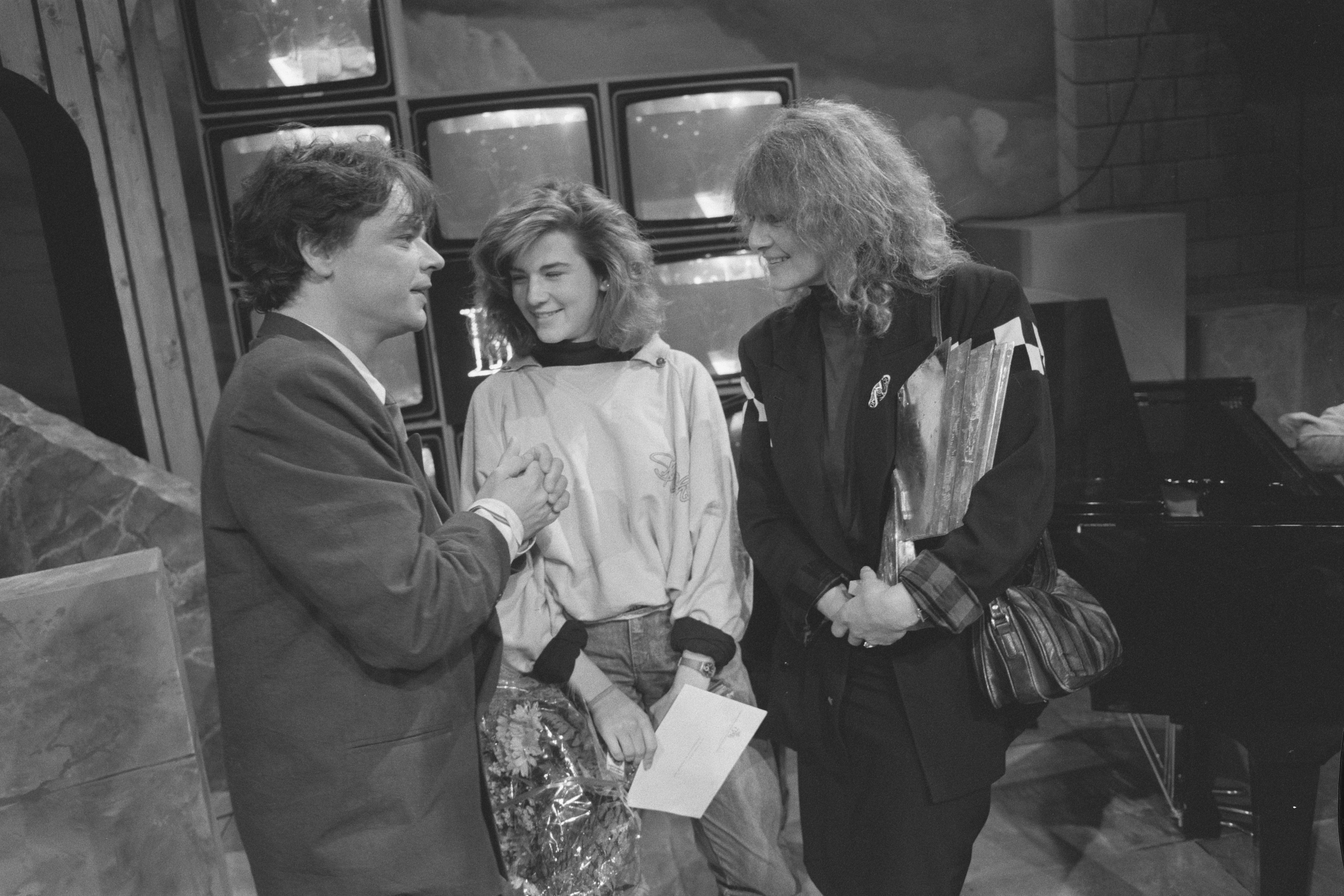 Collectie / Archief : Fotocollectie Anefo Reportage / Serie : [ onbekend ] Beschrijving : Publieksprijs voor het Nederlandse Boek voor Kees van Kooten; Boudewijn Büch (links) na uitreiking met Kim en Barbara van Kooten Datum : 8 november 1987 Trefwoorden : auteurs, boeken, prijzen, schrijvers Persoonsnaam : Büch, Boudewijn, Kooten, Barbara van Fotograaf : Molendijk, Bart / Anefo Auteursrechthebbende : Nationaal Archief Materiaalsoort : Negatief (zwart/wit) Nummer archiefinventaris : bekijk toegang 2.24.01.05 Bestanddeelnummer : 934-1255